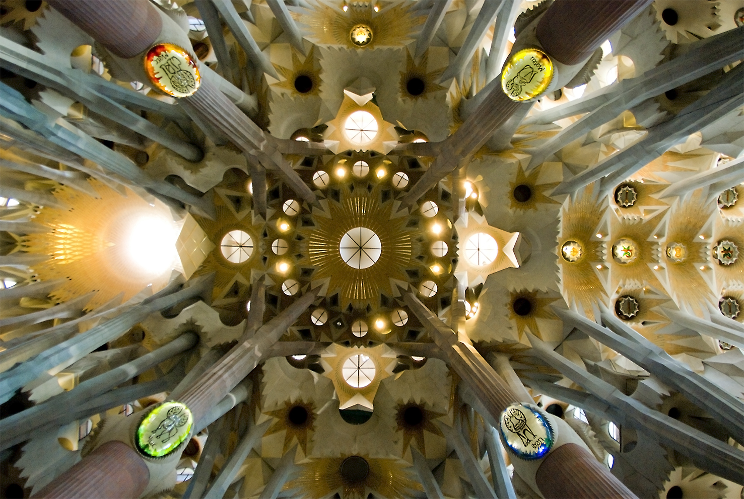 Volta del transsepte del Temple Expiatori de la Sagrada Família (Barcelona)